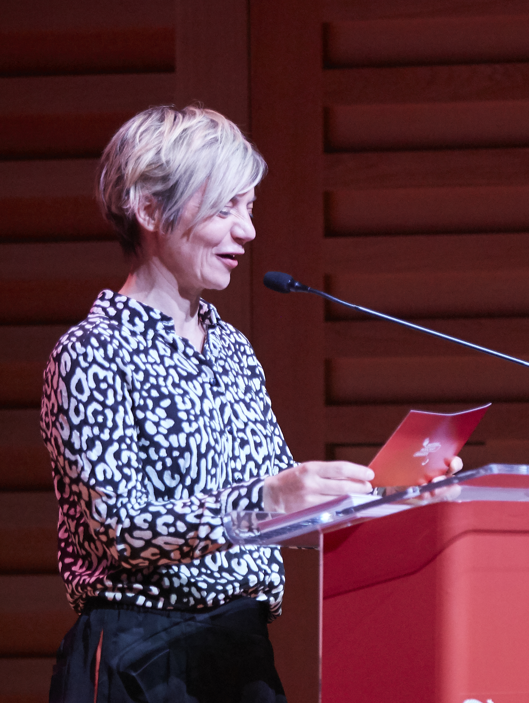 Miranda Sawyer